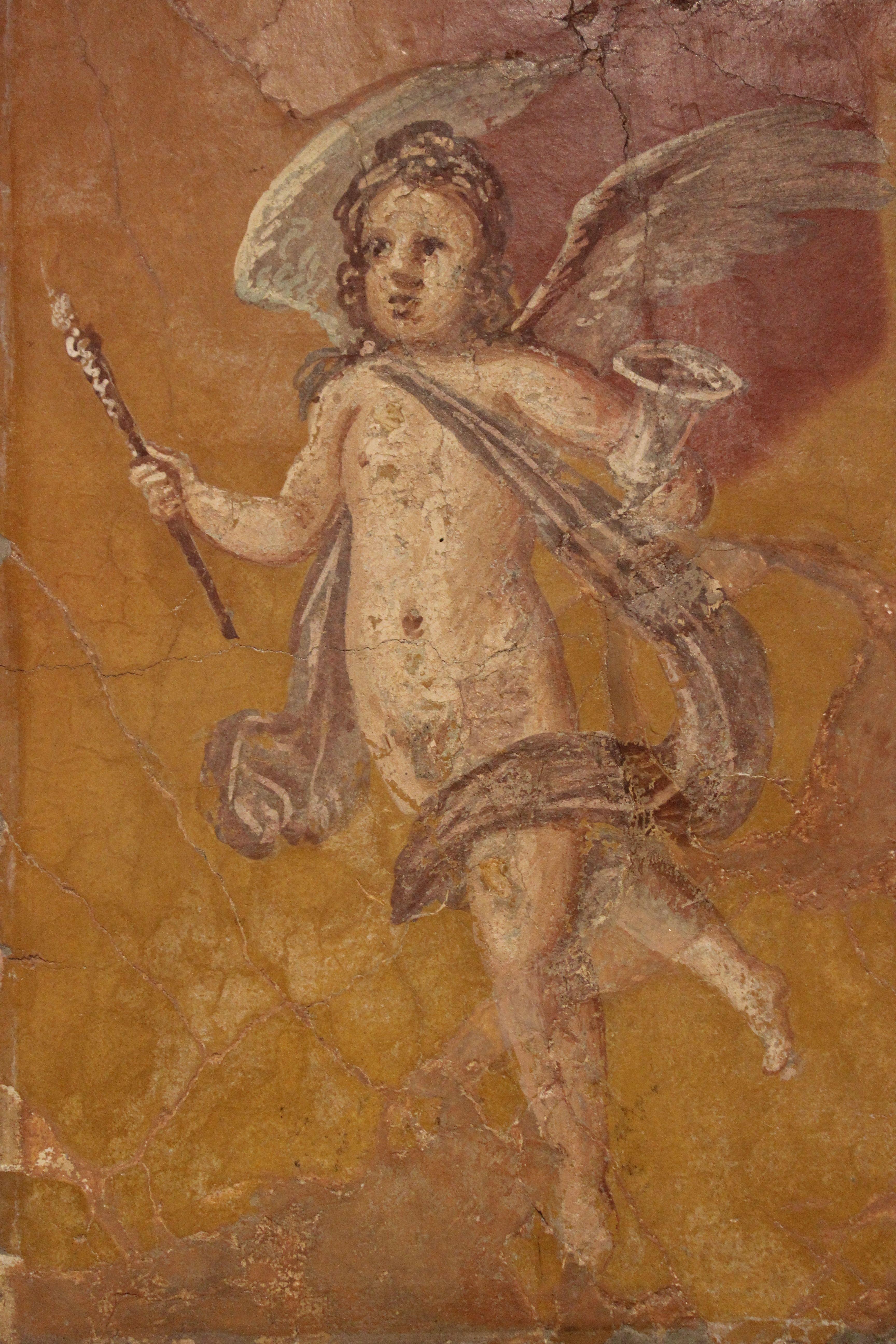 Nápoles. Museo Arqueológico Nacional. Fresco procedente de la Villa dei Papiri en Herculano.